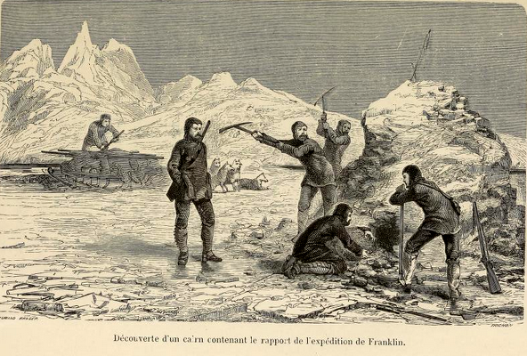 Arthur Mangin, Voyages et Découvertes outre-mer au XIXe siècle, illustrations par Durand-Brager, 1863 ː Découverte du cairn de l'expédition Franklin.